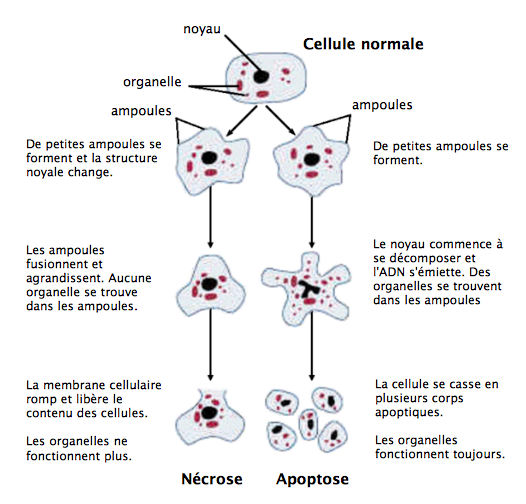 Étapes que suit une cellule lors de la nécrose et l'apoptose.